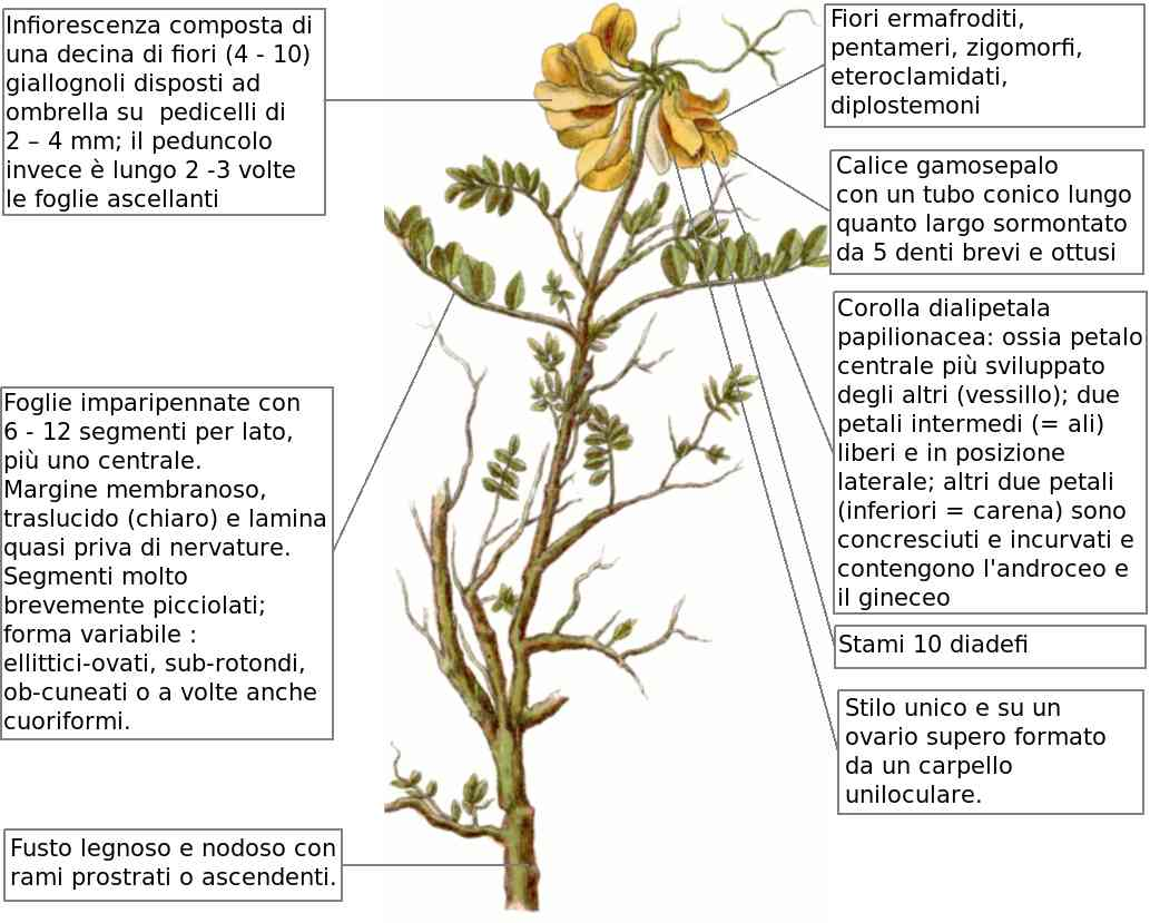 Coronila vaginalis